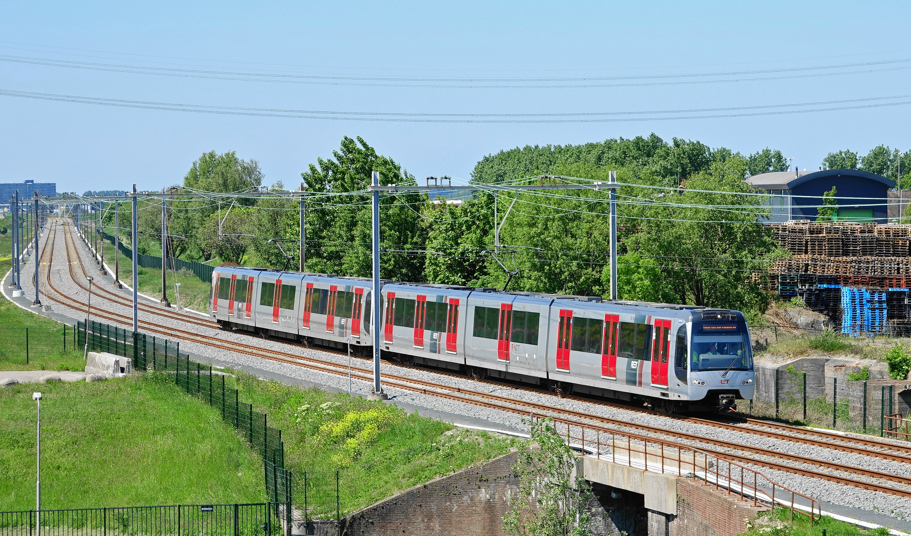 Proefrijden Metro tussen Vlaardingen en Hoek van Holland 15-5-2019